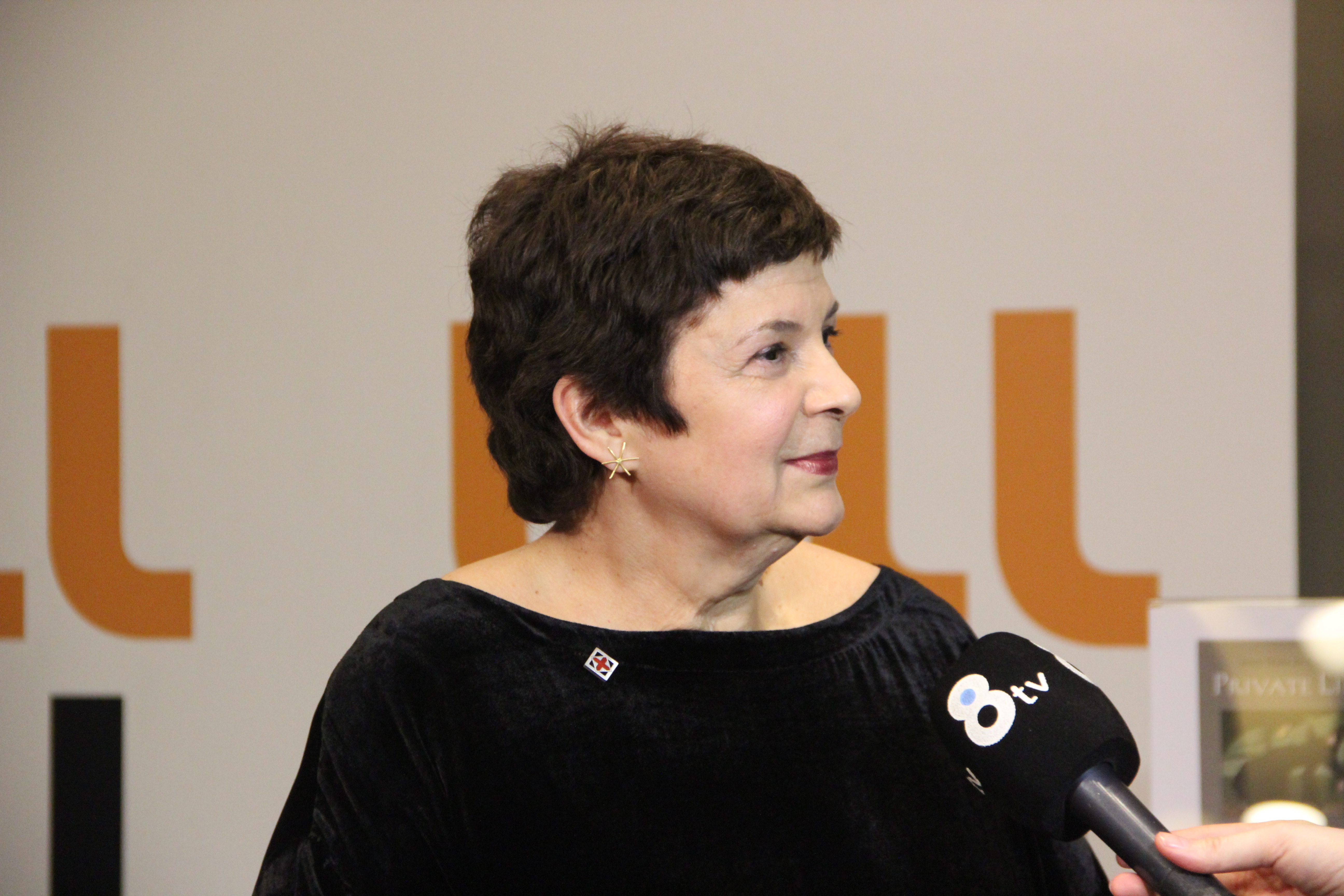 Mary Ann Newman a la presentació de "Private Life" a l'Institut Ramon Llull (2014)